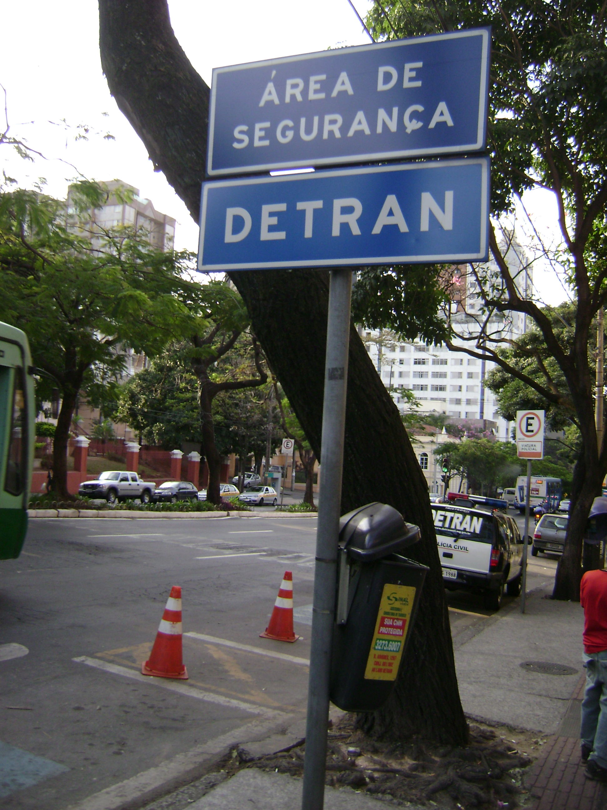 Placa em frente ao DETRAN, em Belo Horizonte, Minas Gerais, Brasil.